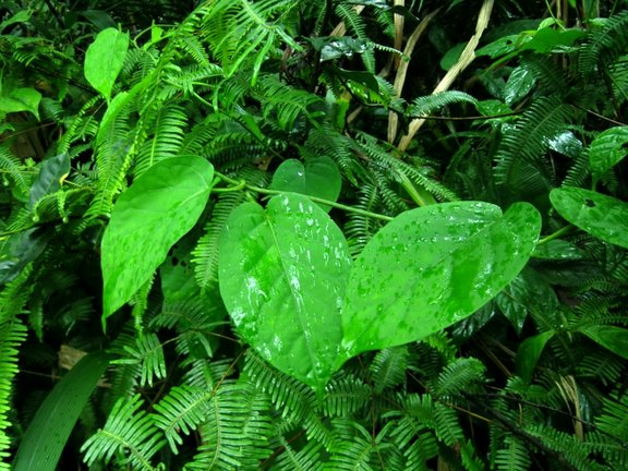 蛇瓣花／羅摩科，對生，有乳汁，有毒。葉基心形，有一點刺。